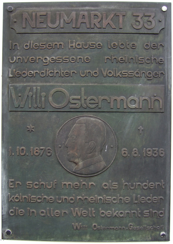 Gedenktafel an Haus-Nr. 33 des Neumarktes in Köln, in dem Willi Ostermann zuletzt gelebt hat und 1936 gestorben ist.